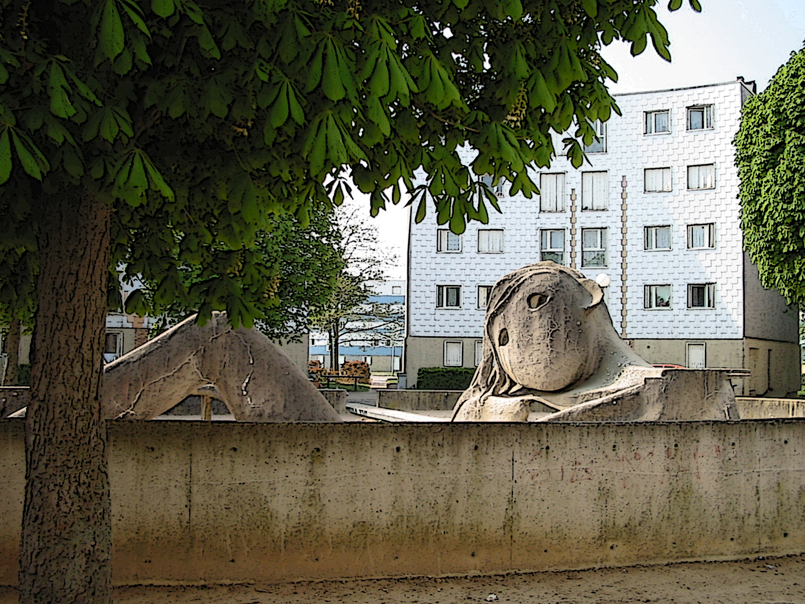 France - Ile-de-France - Essonne - Grigny - Place de l'Oeuf